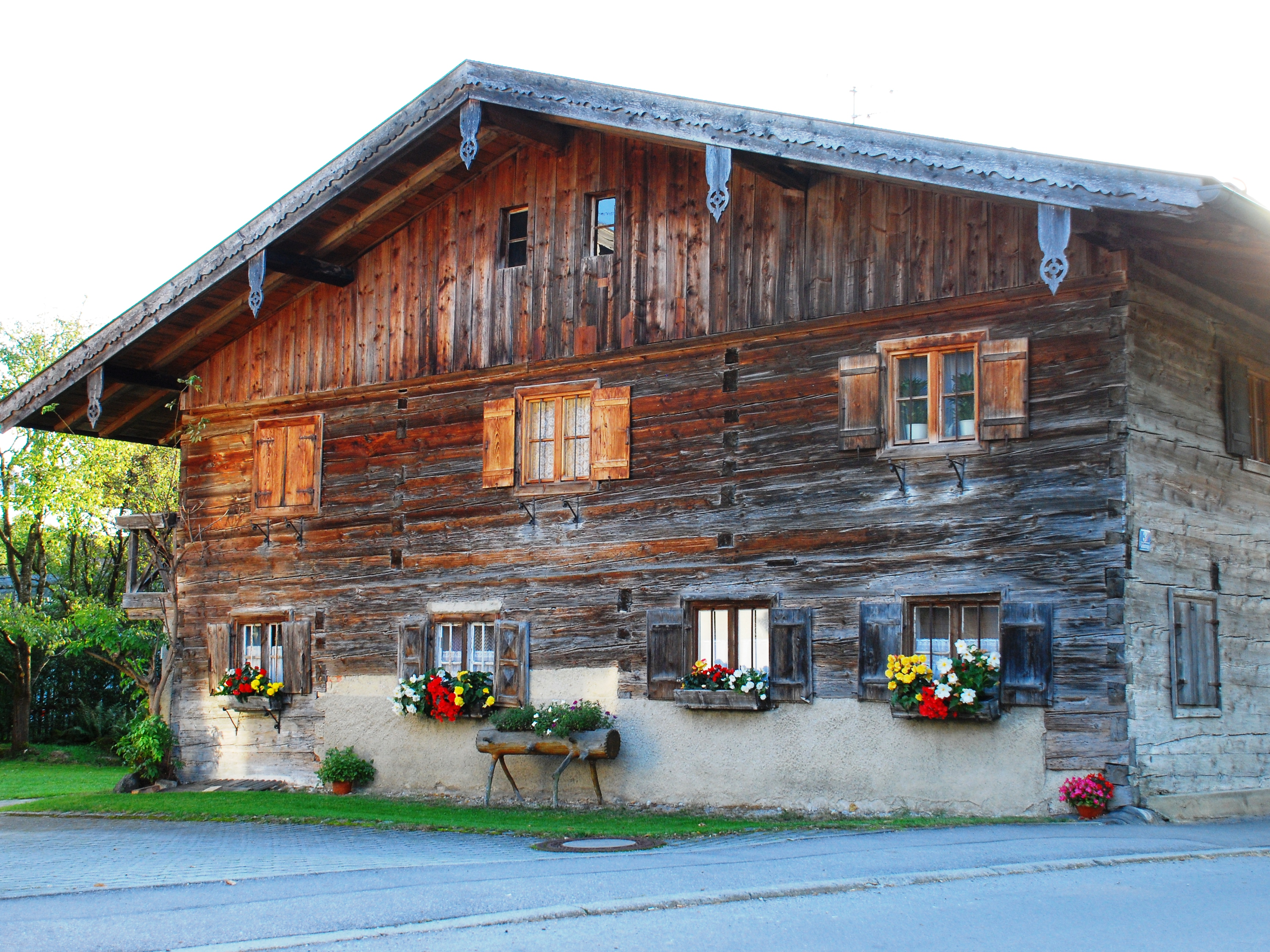 Bauernhof "Beim Sixweber" in Großhelfendorf, Ortsteil von Aying, Landkreis München, Regierungsbezirk Oberbayern, Bayern. Als Baudenkmal unter Aktennummer D-1-84-137-32 in der Bayerischen Denkmalliste aufgeführt. Bild gemäß den Vorgaben zur Panoramafreiheit von öffentlichem Verkehrsgrund aus aufgenommen.